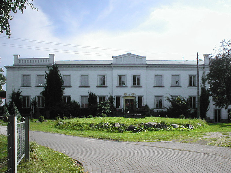 Gutshaus im Tudorstil in Neukalen-Schorrentin, Mecklenburg-Vorpommern, Deutschland